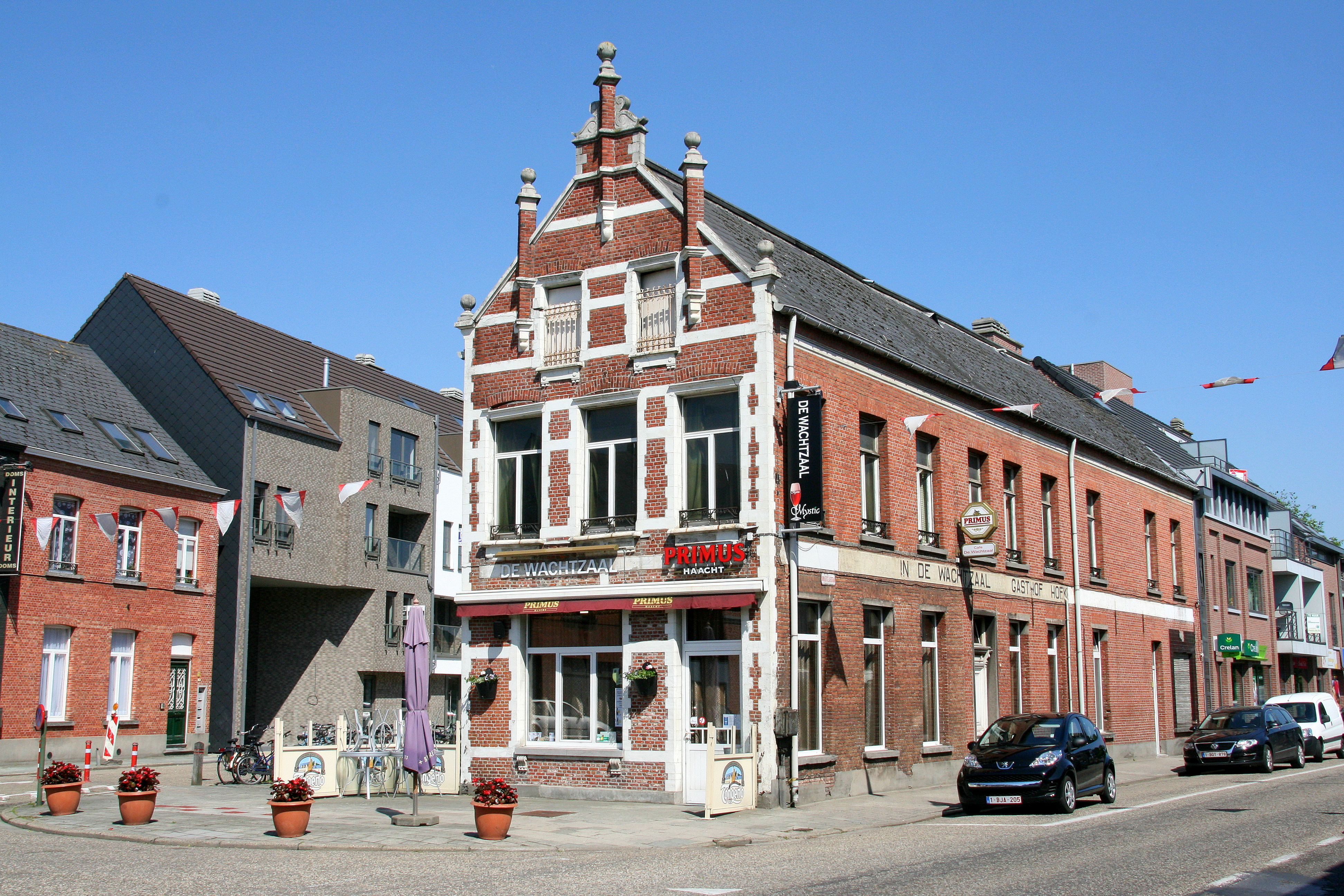 Café-feestzaal "De Wachtzaal", vroeger lokaal van de Sint-Sebastiaansgilde. In 1885 gebouwd hoekhuis van twee op drie traveeën en één bouwlaag, in 1894 afgewerkt met kopgevel in neo-Vlaamse renaissance naar ontwerp van E. Pelgrims. Feestzaal in eclectische stijl van circa 1908-1909 naar ontwerp van Borgerhouts architect F. Mertens.